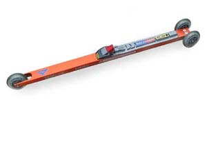 Klassikroller mit 80mm PU-Räder